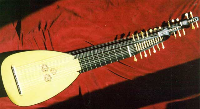 A baroque & classical eras lute.